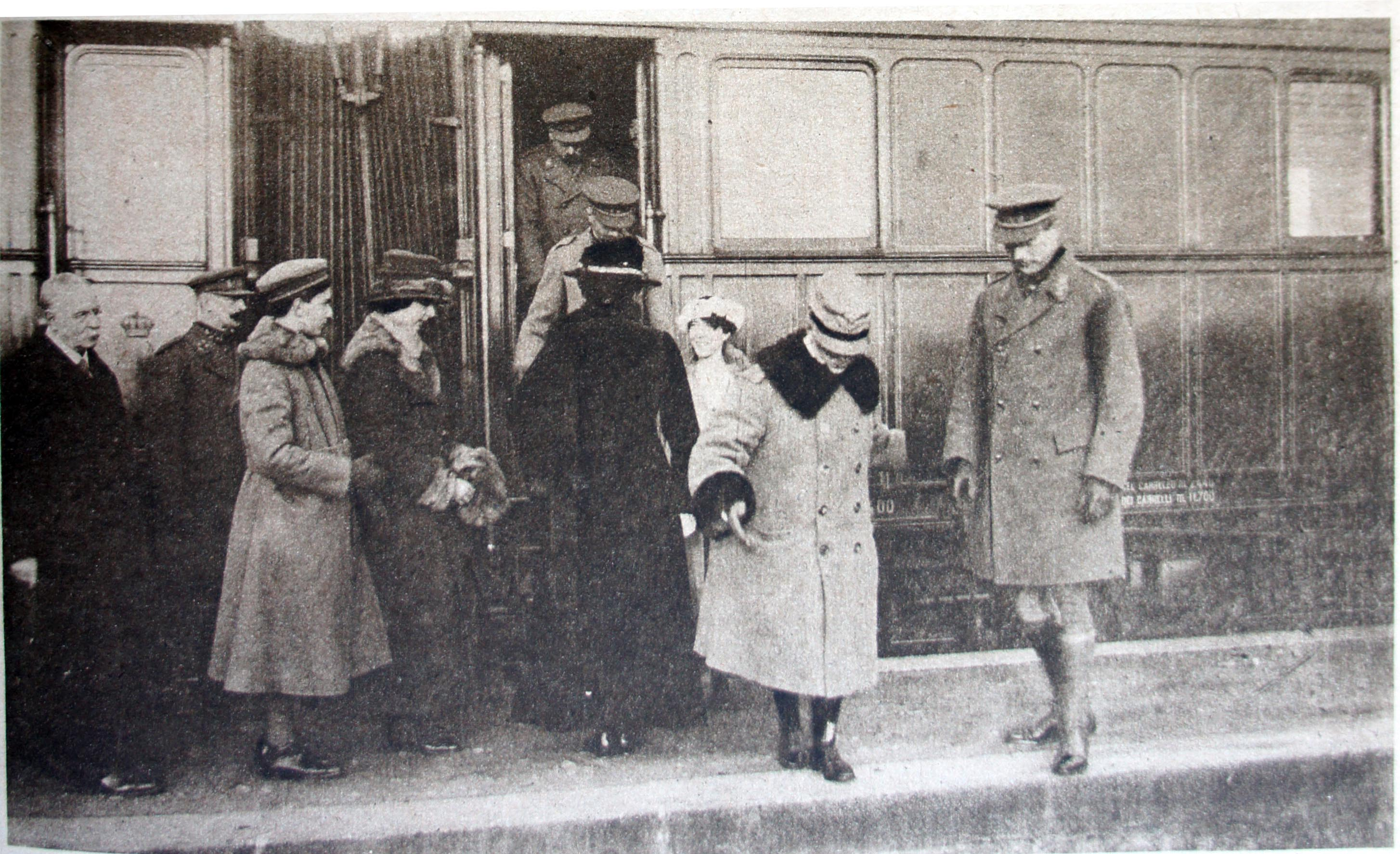 Le Miroir N°224, page 13, de gauche à doite le prince Umberto, Mafalda, la reine d'Italie de dos et de la reine de Belgique, de face Victor-Emmanuel III et Albert I. Les souverains belges rendaient visite aux troupes sur le front italien.